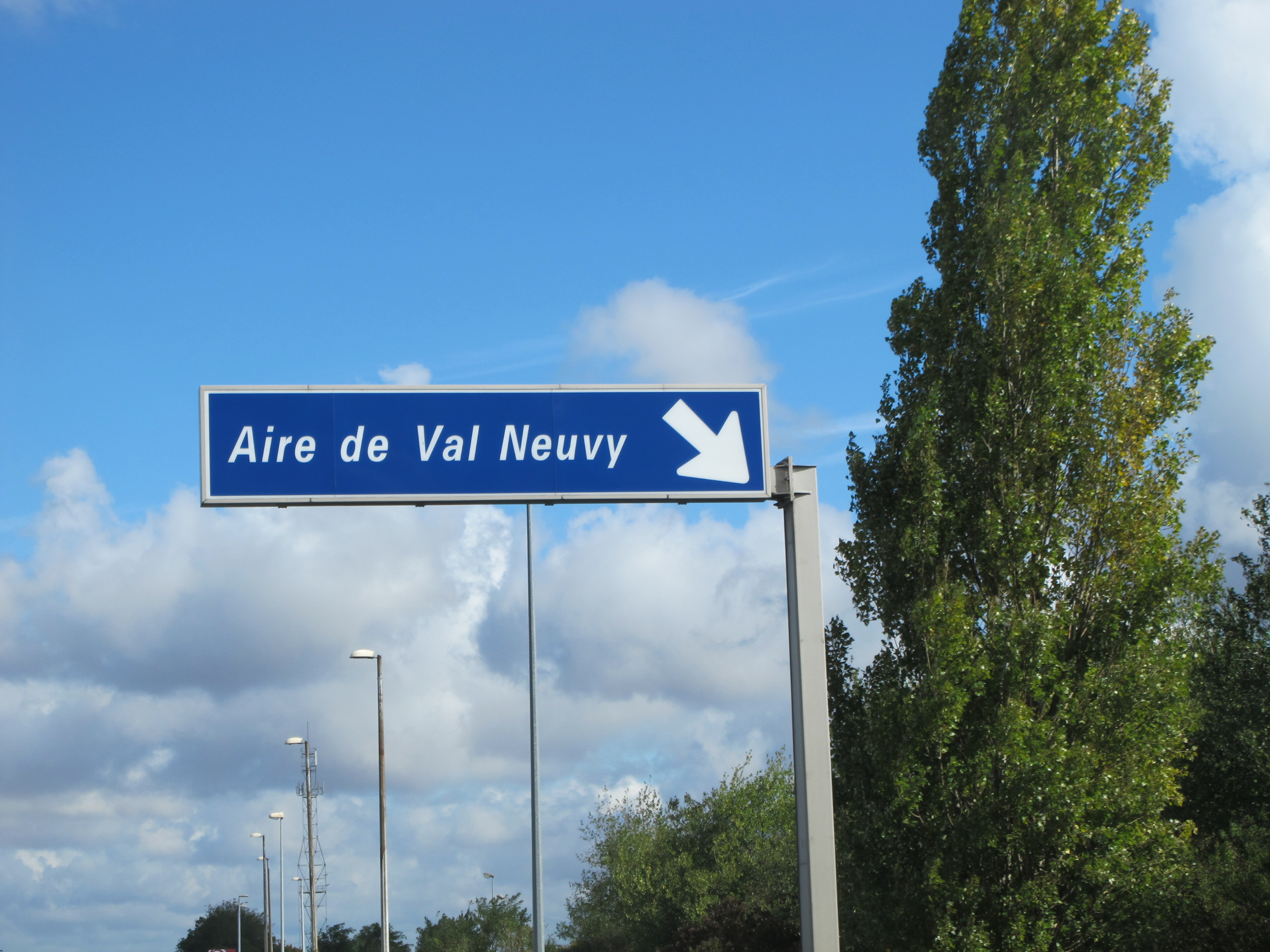 aire de service de Val-Neuvy (entre Orléans et Marcoussis), autoroute A10 (sens sud-nord), commune de Fresnay-l'Évêque, Eure-et-Loir (France).